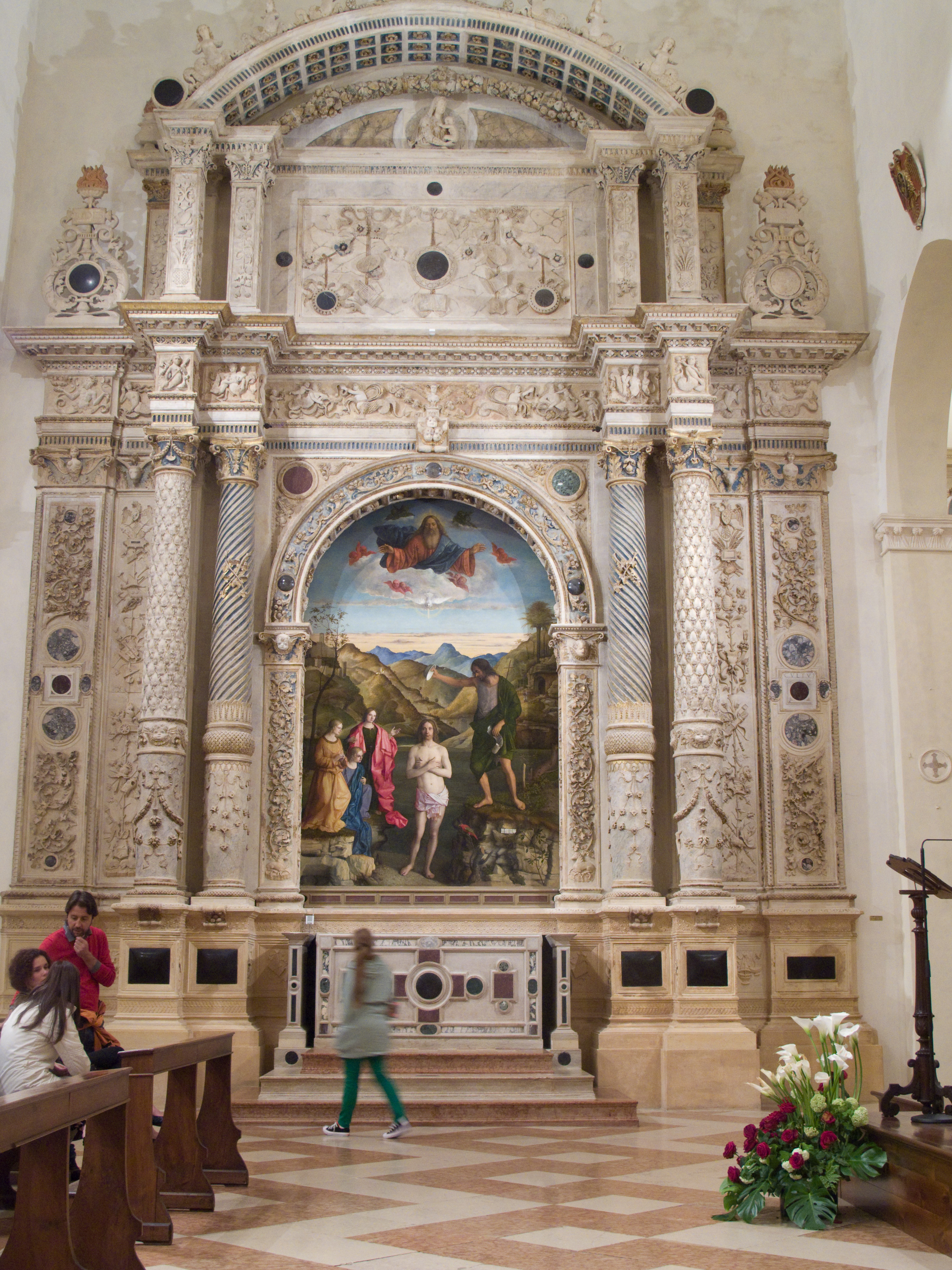 Vicenza - Chiesa di Santa Corona - Altare Garzadori